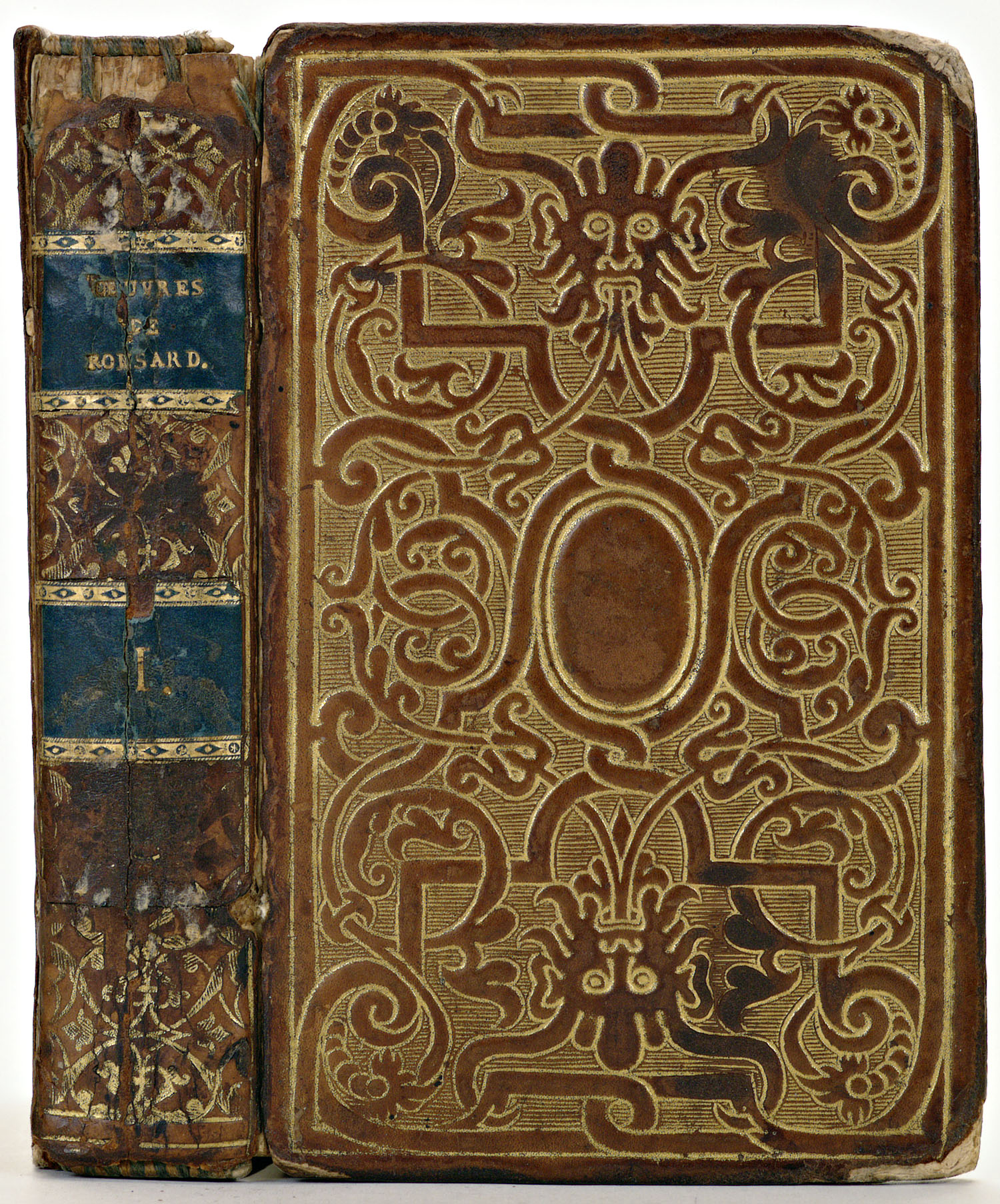 Inhoud: Titelblad ontbreekt [Oeuvres de Pierre de Ronsard, Paris, G. Buon, 1571]